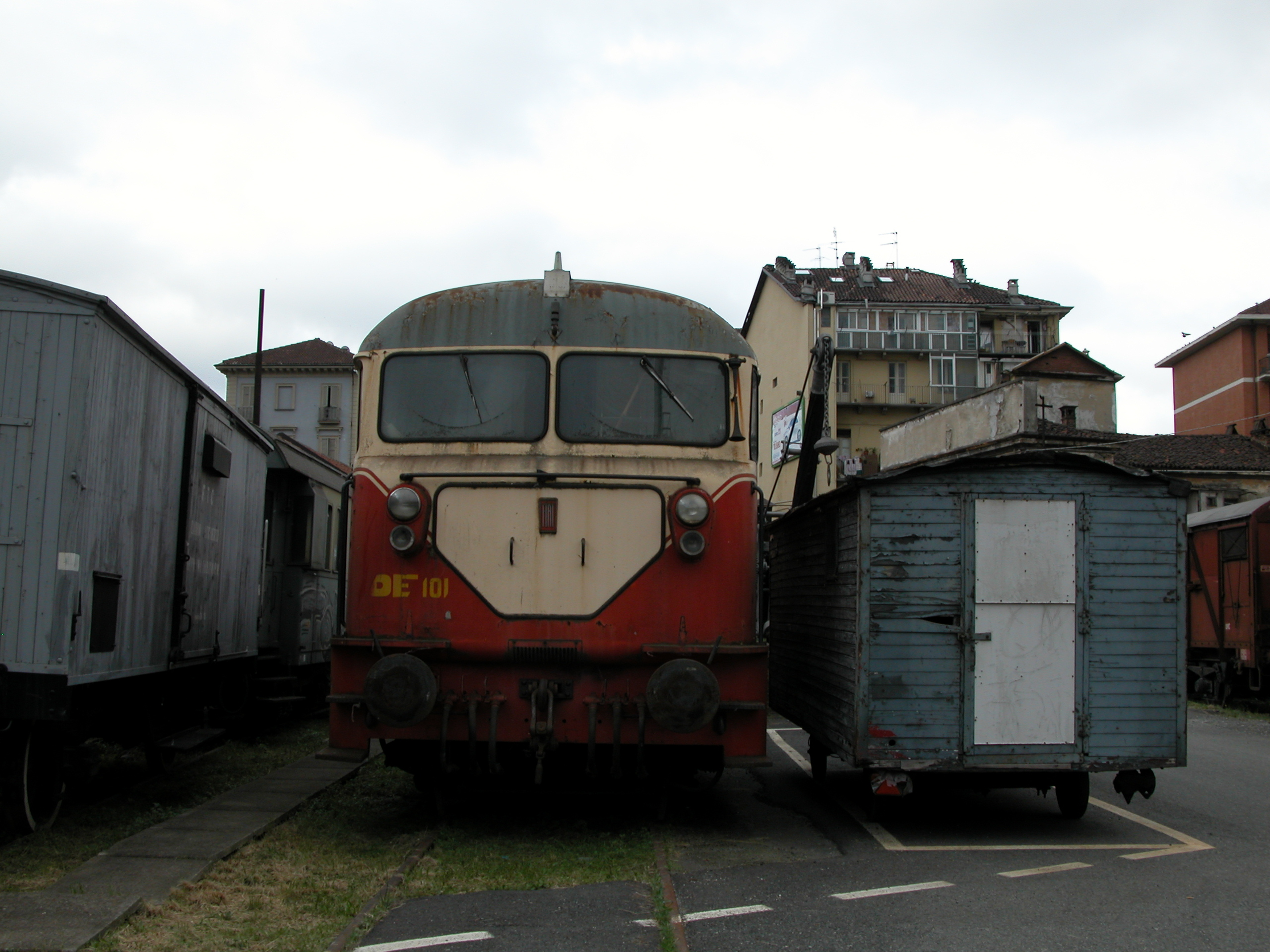 Locomotiva Diesel-elettrica DE 101 della SATTI (tipo FIAT 7144) nella ex stazione di Torino Porta Milano della Ferrovia Torino-Ceres.